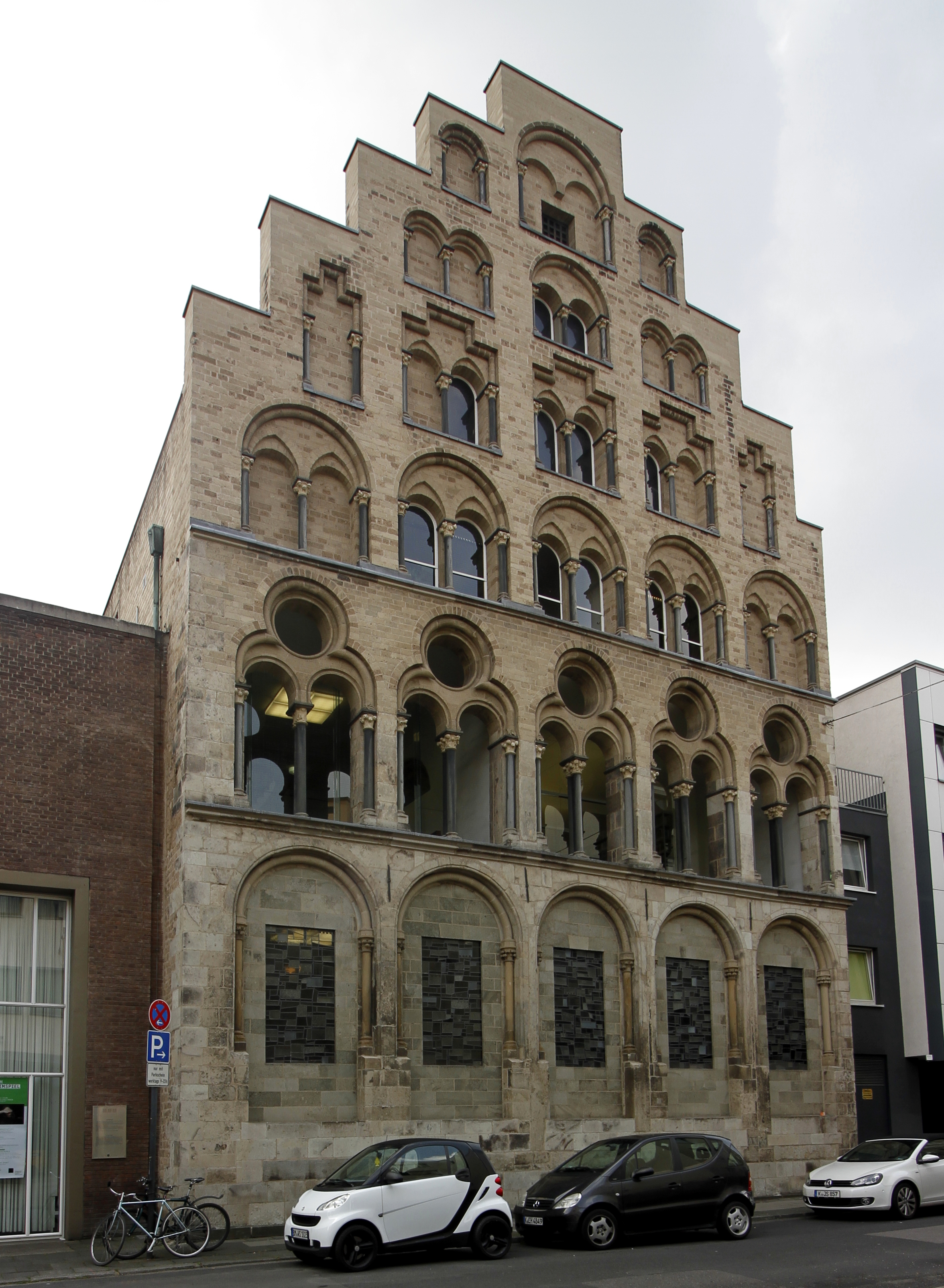 Overstolzenhaus - Cologne